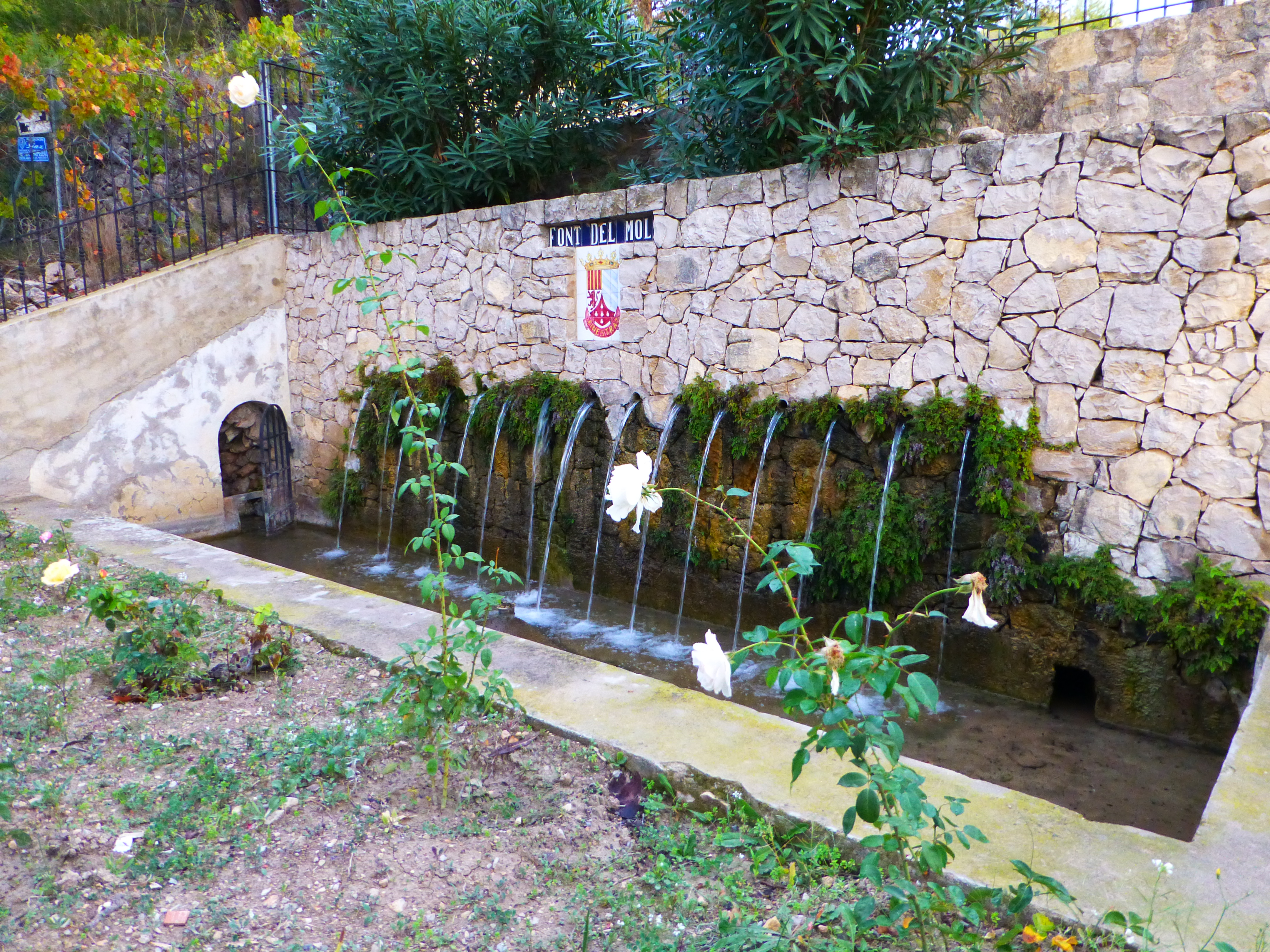 Font del Molí. Finestrat, Alicante, España.